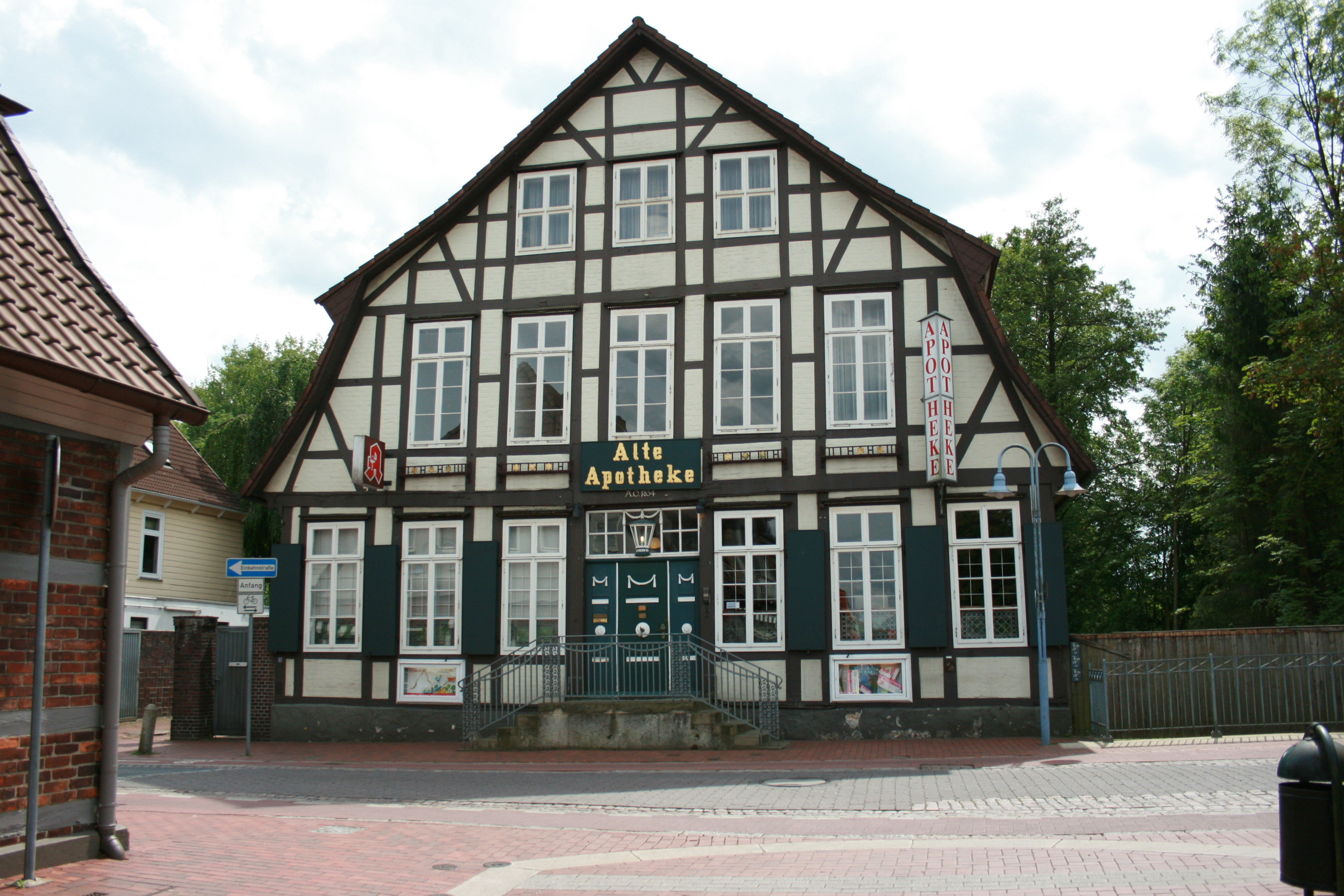 Alte Apotheke auf der Goethestraße in Rotenburg (Wümme)